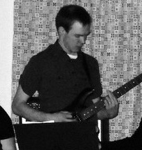 Sweden